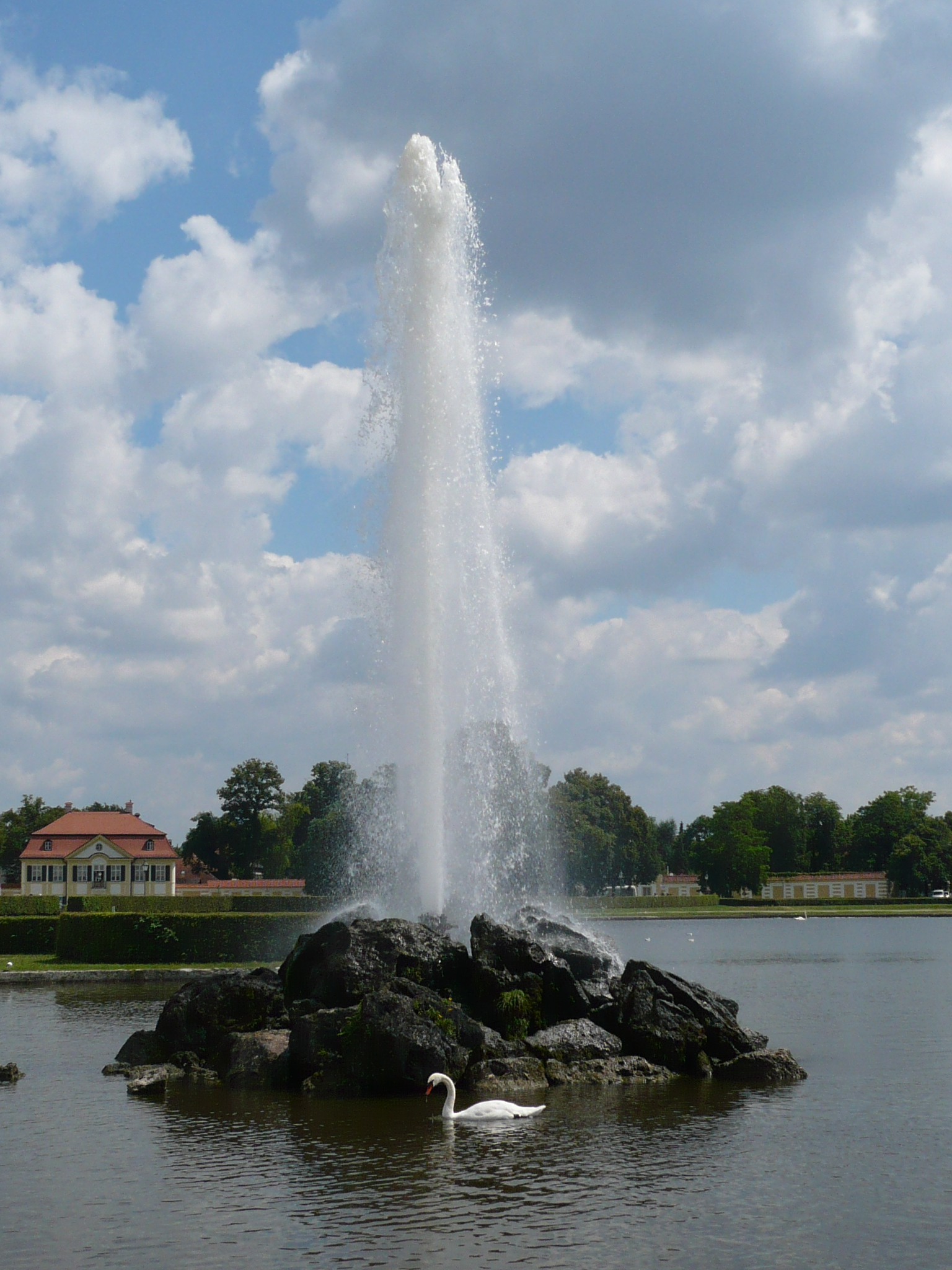 Fontäne vor im Schlossrodell Nymphenburg in München